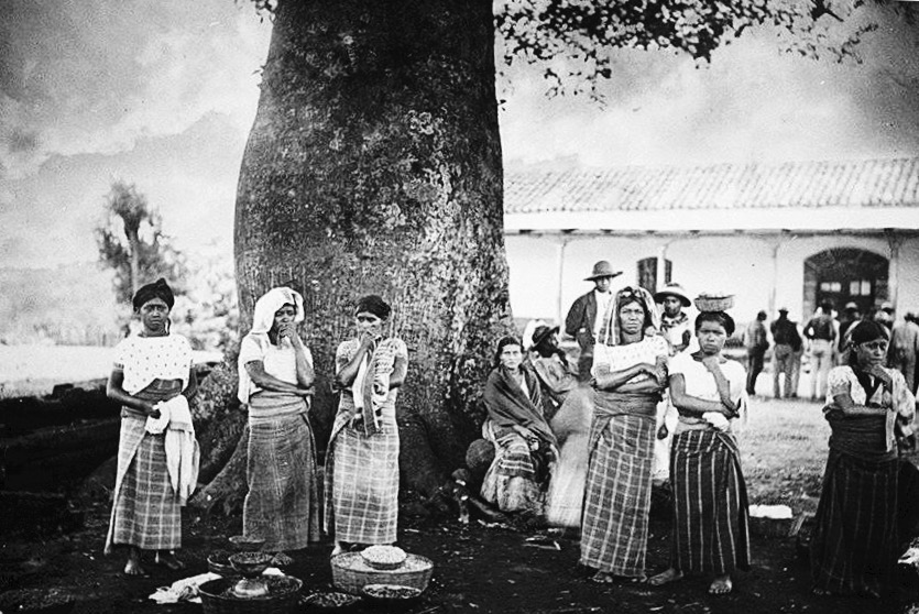 Fotografías de Juan José de Jesús Yas en Antigua Guatemala y sus alrededores en la década de 1910.